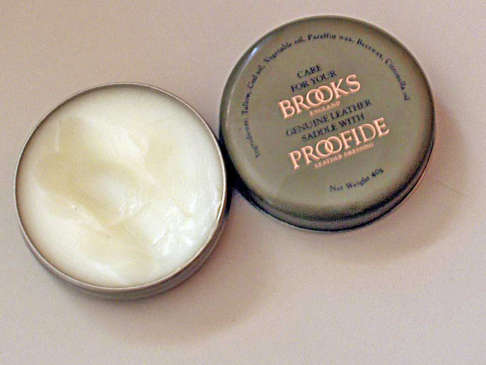 Suedelfett vu Brooks